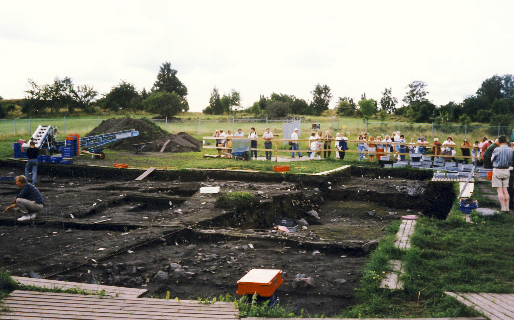 Utgrävningar i "Svarat jorden" Birka 1991